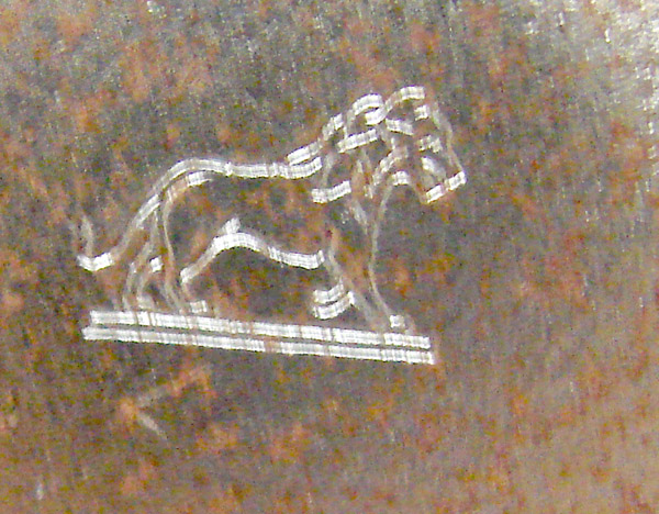 Collection du Musée de l'horlogerie de Saint-Nicolas d'Aliermont